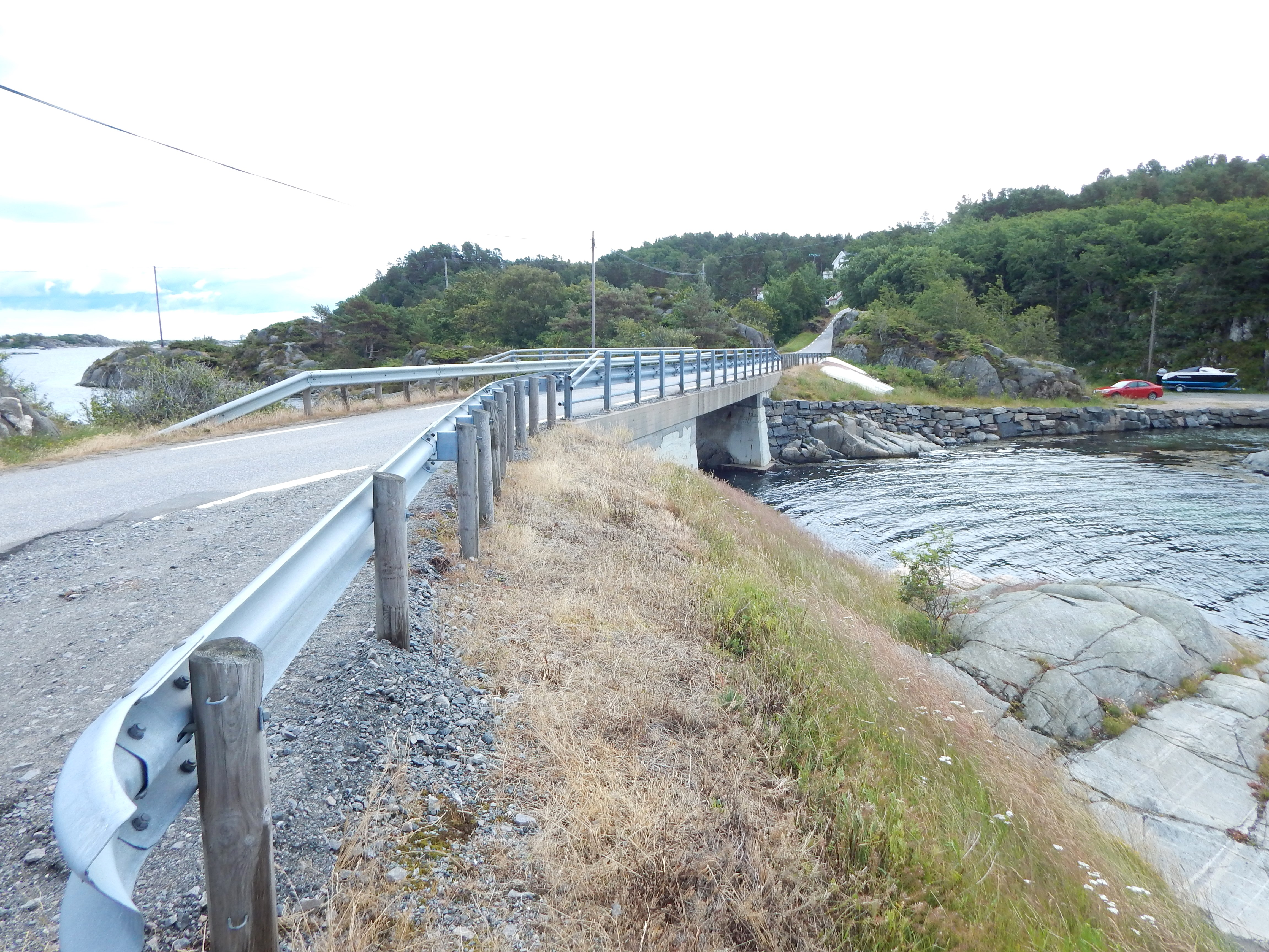 Fylkesvei 221 ved Indresund